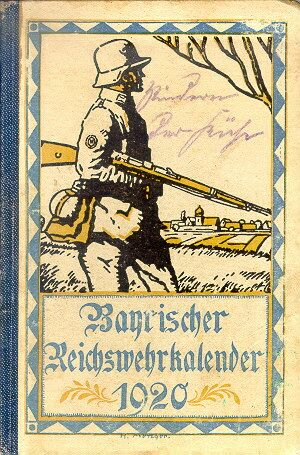 Bayrischer Reichswehrkalender 1920